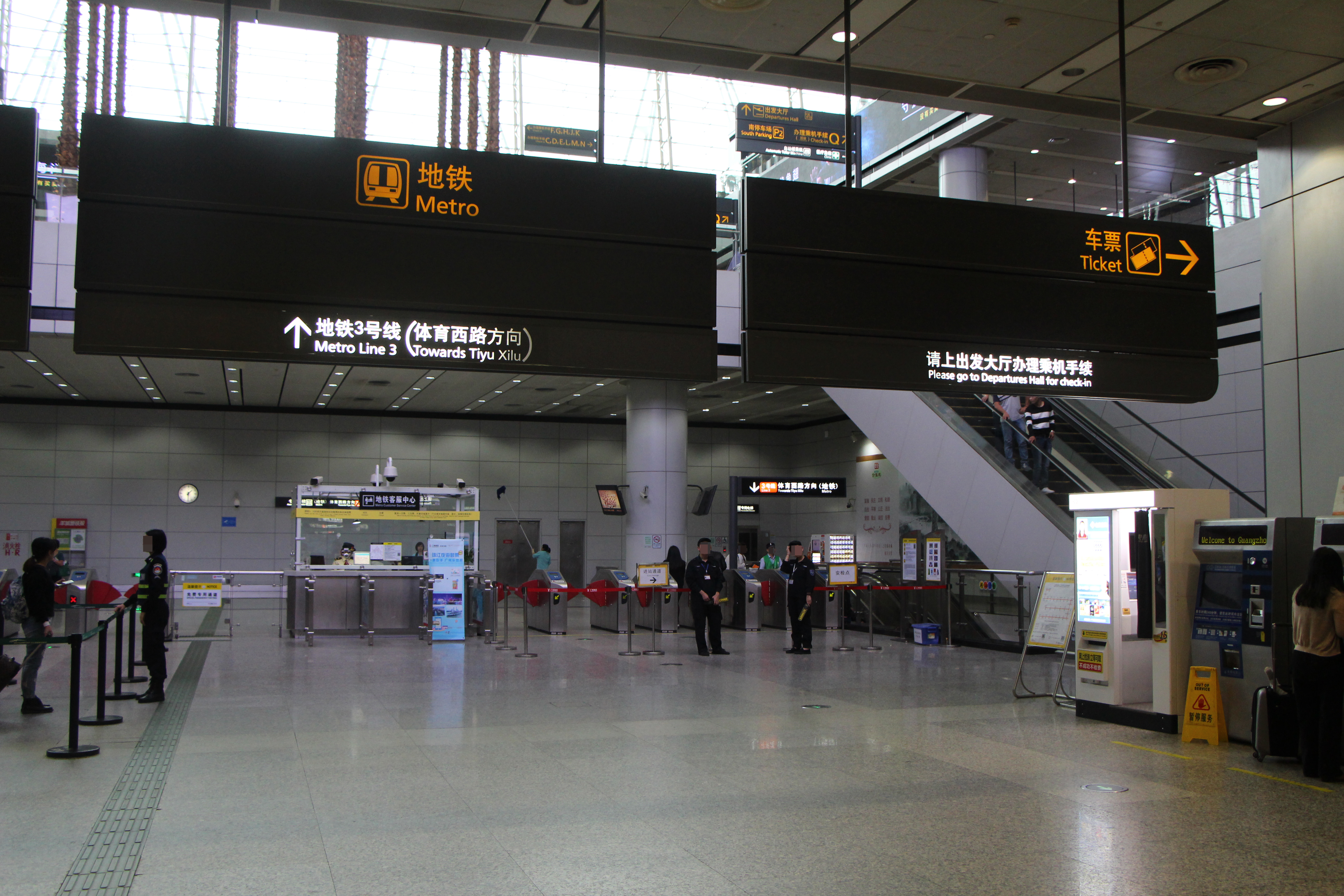 广州地铁机场南站